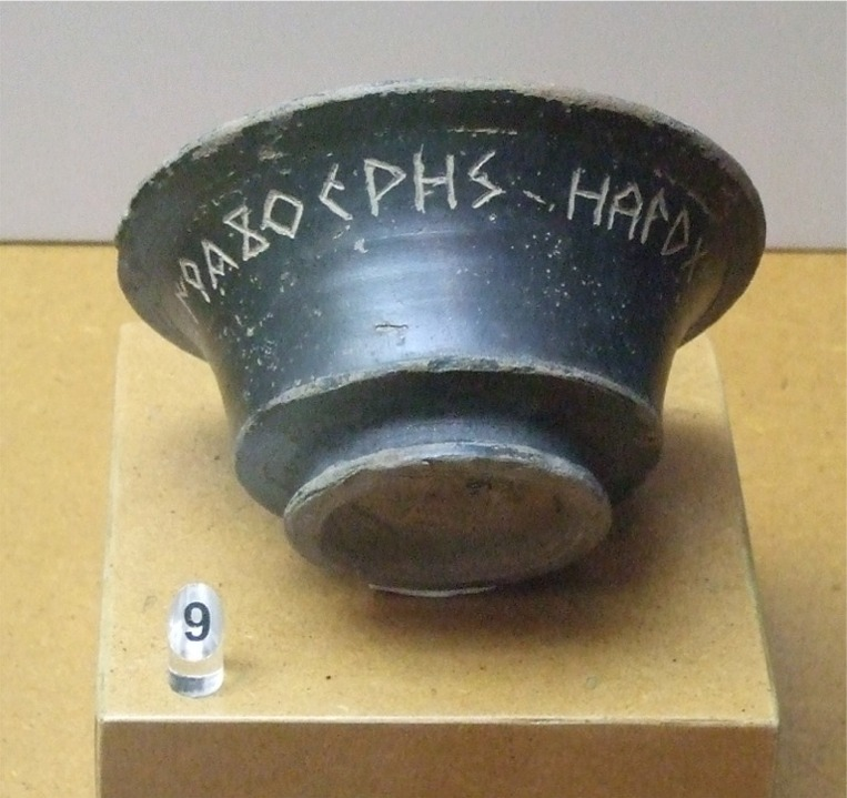 (9) Grafito falso turtibeirkakokeaos ocalakom sobre cerámica campaniense (siglo I adC). Cabezo de Alcalá (Azaila, Teruel). Museo de Zaragoza